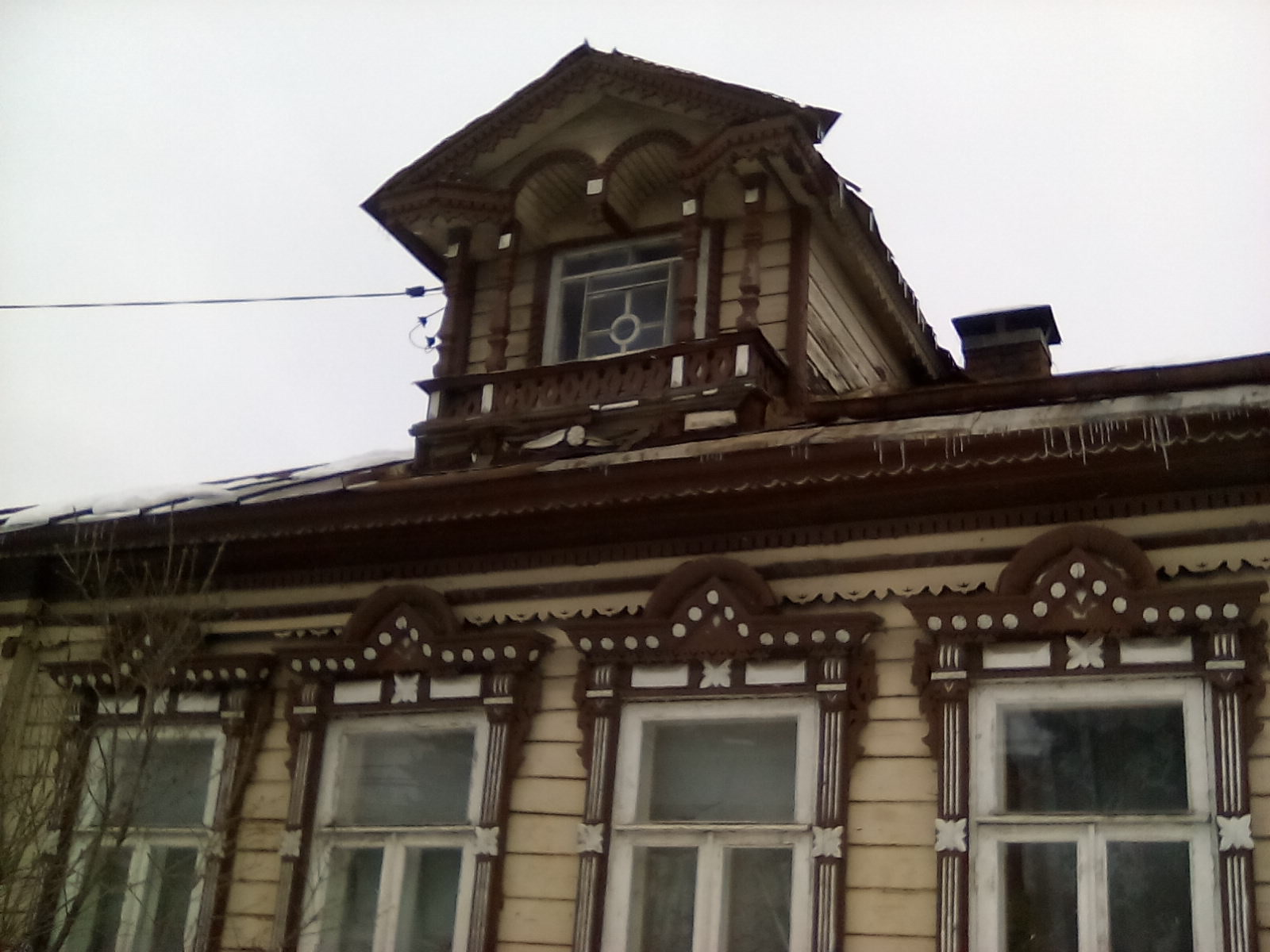 Павловский Посад, Большая Покровская 22